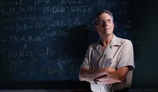 פרופסות לדינמיקה כימית אברהם ניצן